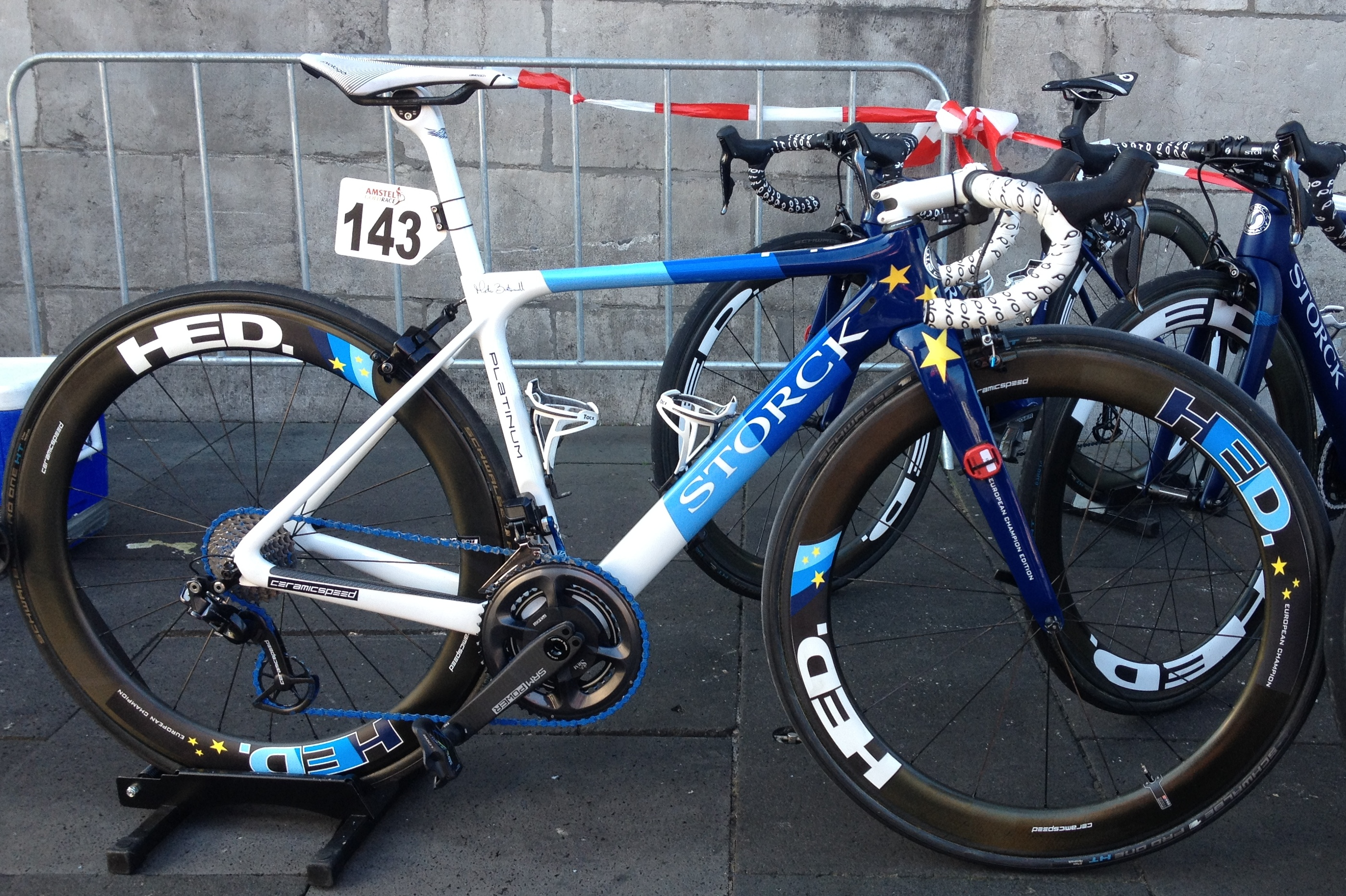 Start van de Amstel Gold Race Ladies Edition 2019 in Maastricht